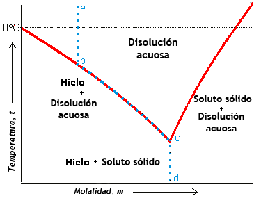 Diagrama de fases de una disolución acuosa